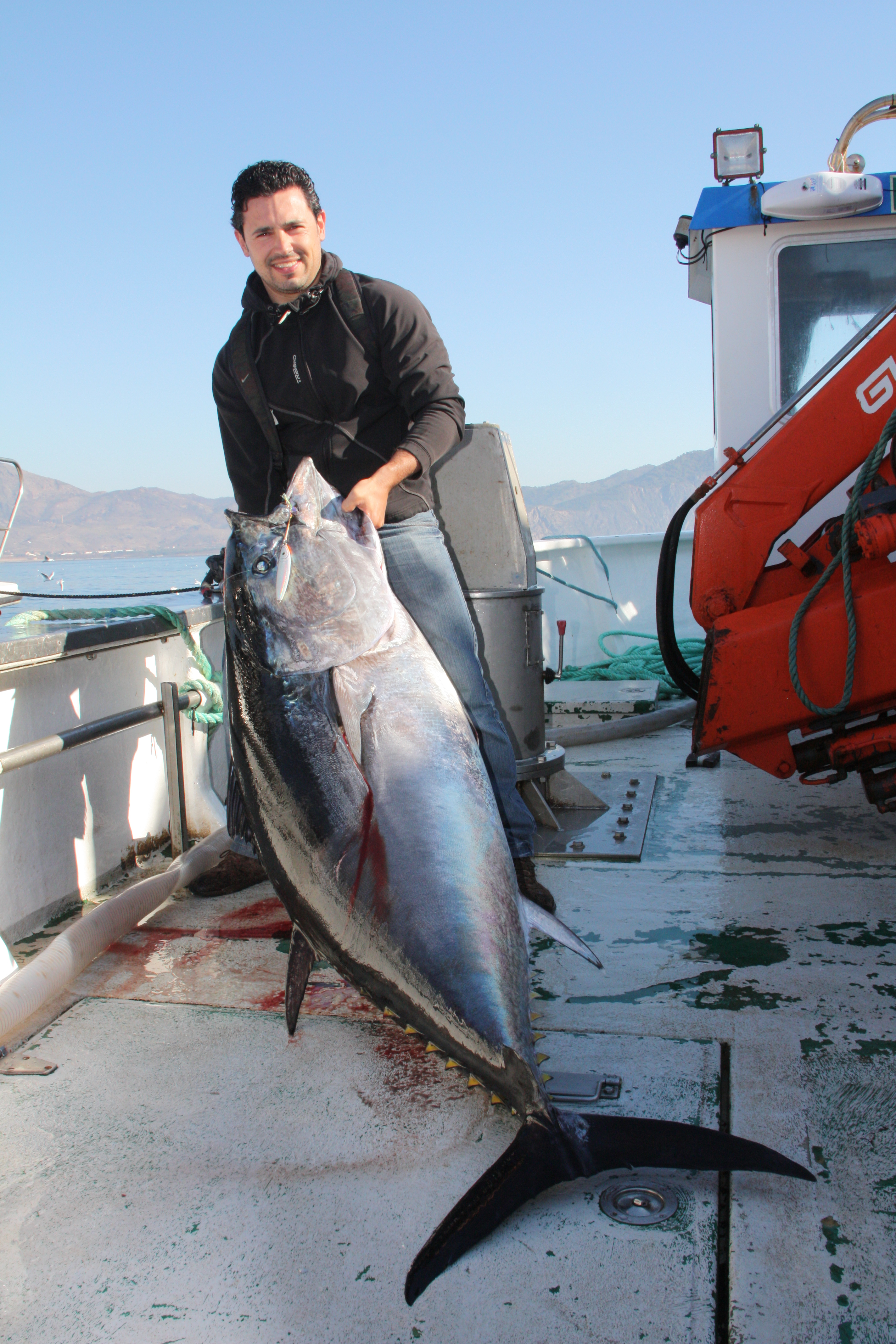 Atún rojo, thunnus thynnus, pescado en la modalidad de jigging extremo, en Cabo de Palos, Murcia, por un conocido aficionado de la zona. Este pescador deportivo, lucho durante más de una hora para conseguir la rendición del tan colosal ejemplar que supero los 100 kilos en la báscula.